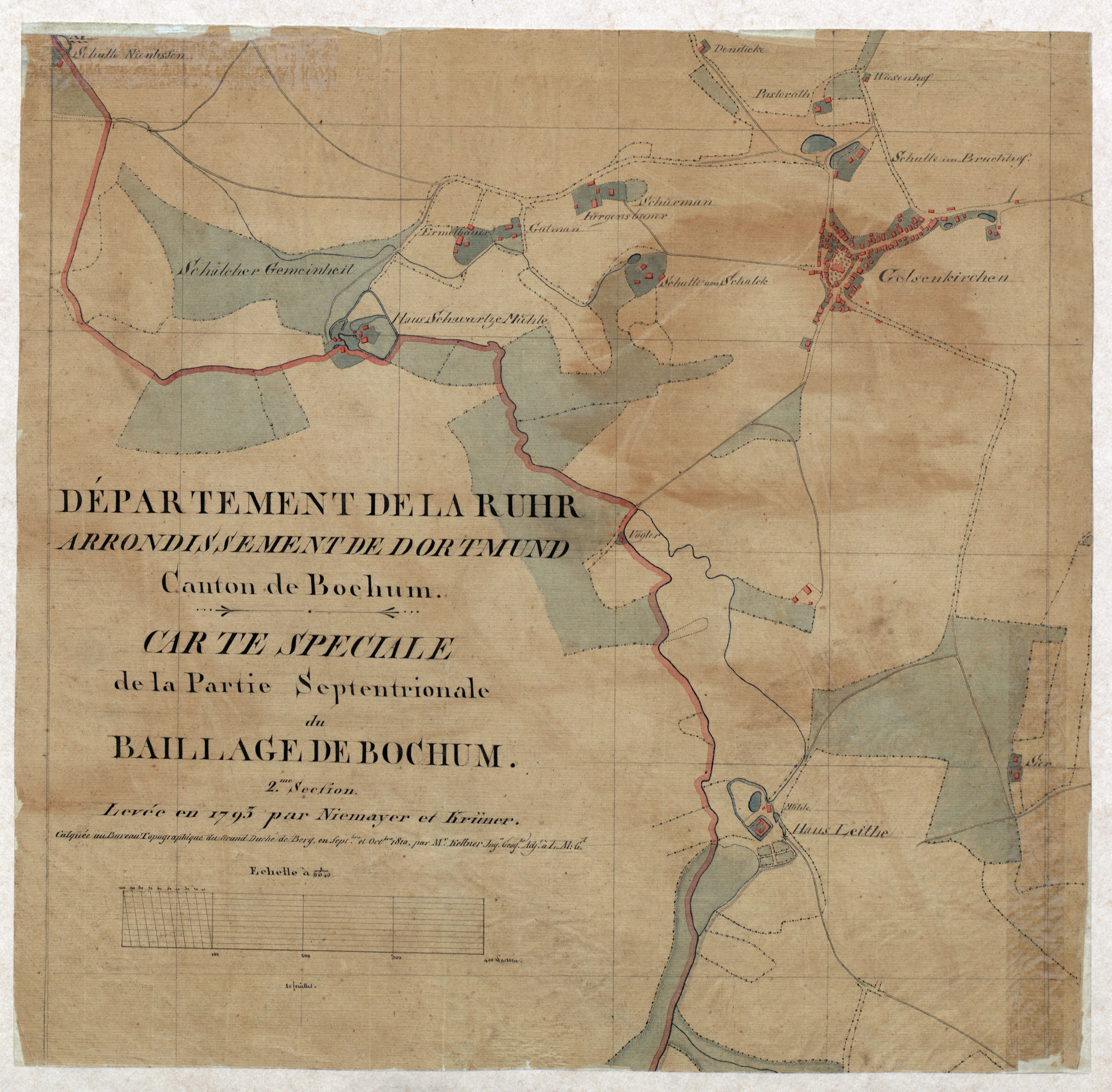 Spezialkarte des nördlichen Bereichs des Amts Bochum. Nachdruck „Carte speciale des mines“.